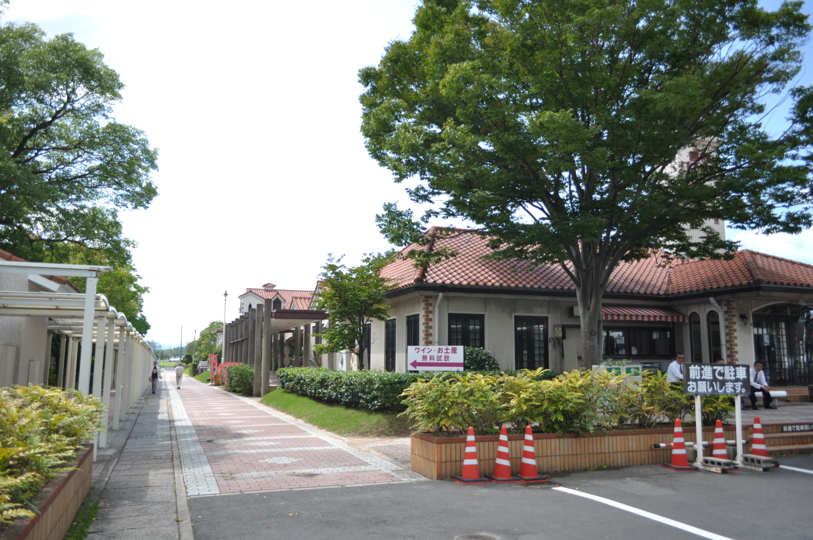 （2015年9月11日撮影）